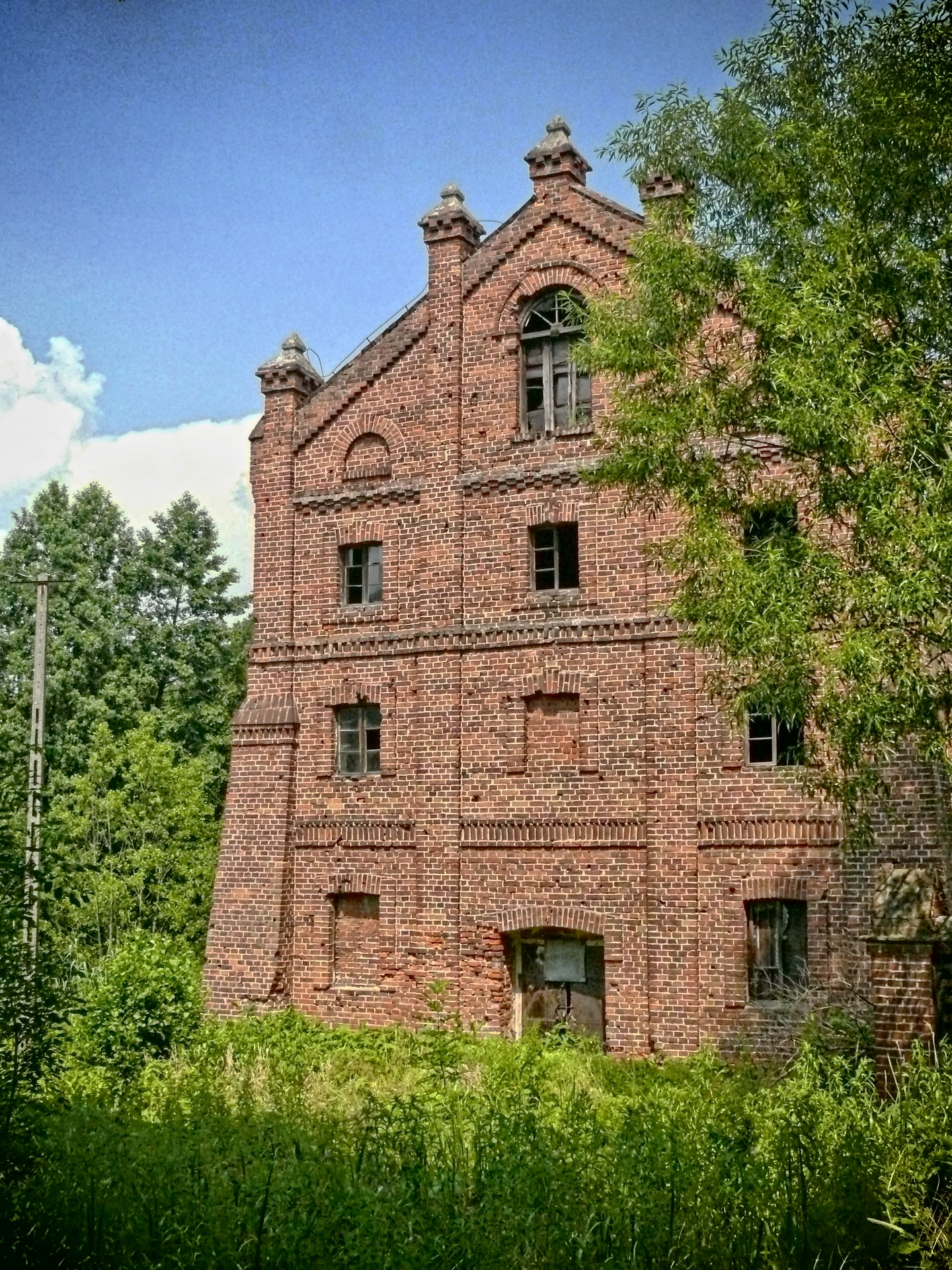 Zabytkowy młyn w Woli Rudzkiej, woj. lubelskie.